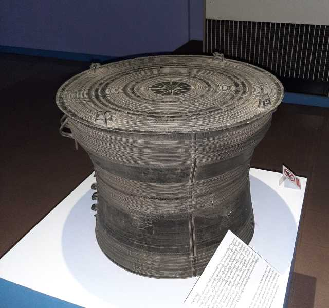 မြန်မာဘာသာ: ဖားစည်သည် ကရင်တမျိုးသားလုံးအား ကိုယ်စားပြုသည့် တူရိယာ တစ်မျိုး ဖြစ်သည်။ စကောကရင်လို (ကျိဢ်) ဟုခေါ်ပြီး ပိုးကရင်က ကလူး(ကၠေါဟ်) ဟု ခေါ်သည်။